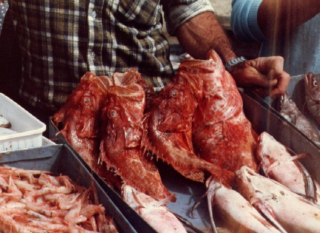 Fish market in Marsaxlokk, west coast of Malta Rybí trh v Marsaxlokk, západní pobřeží Malty Fischmarkt in Marsaxlokk, Westkúste Maltas